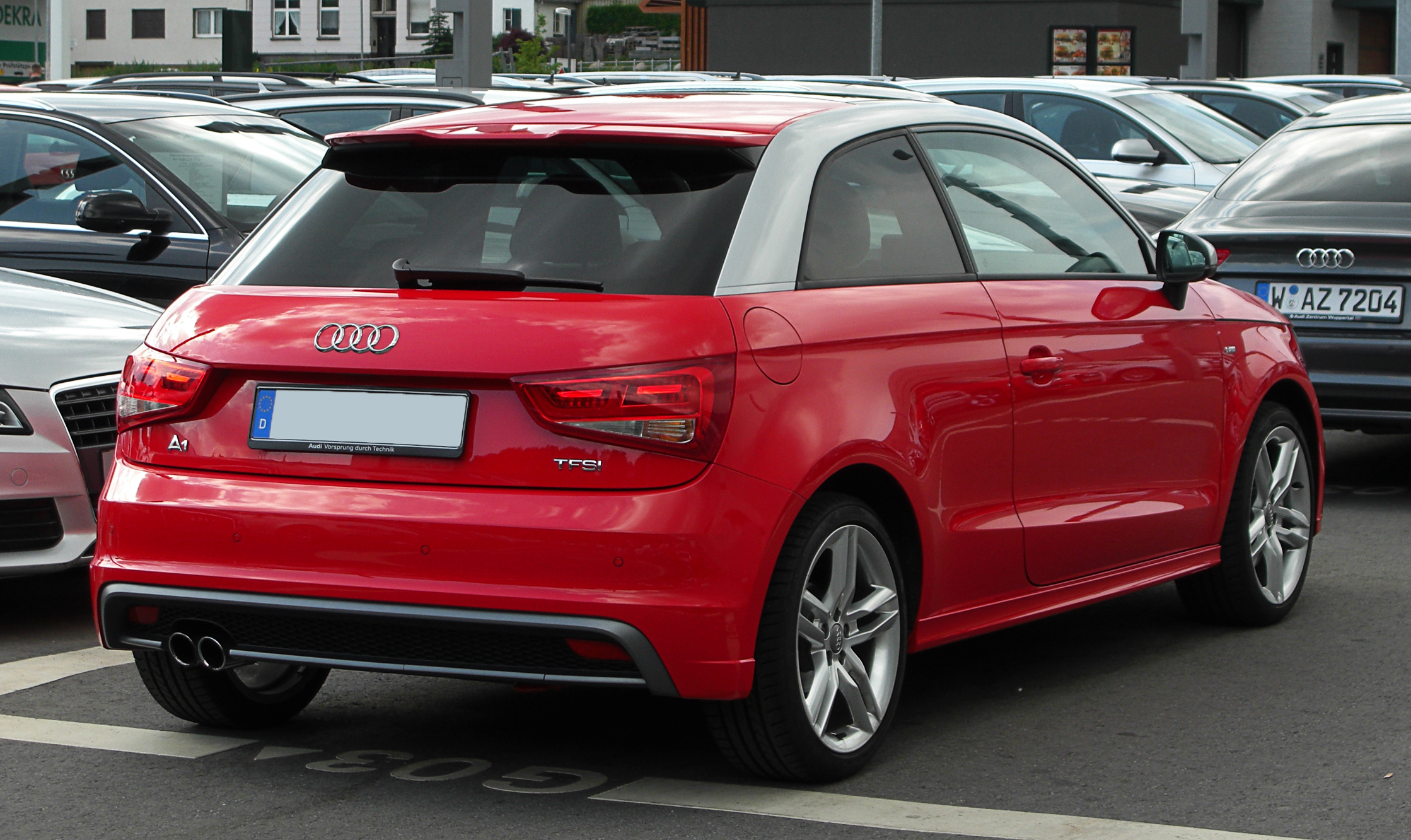 Audi A1 1.4 TFSI Ambition S-line